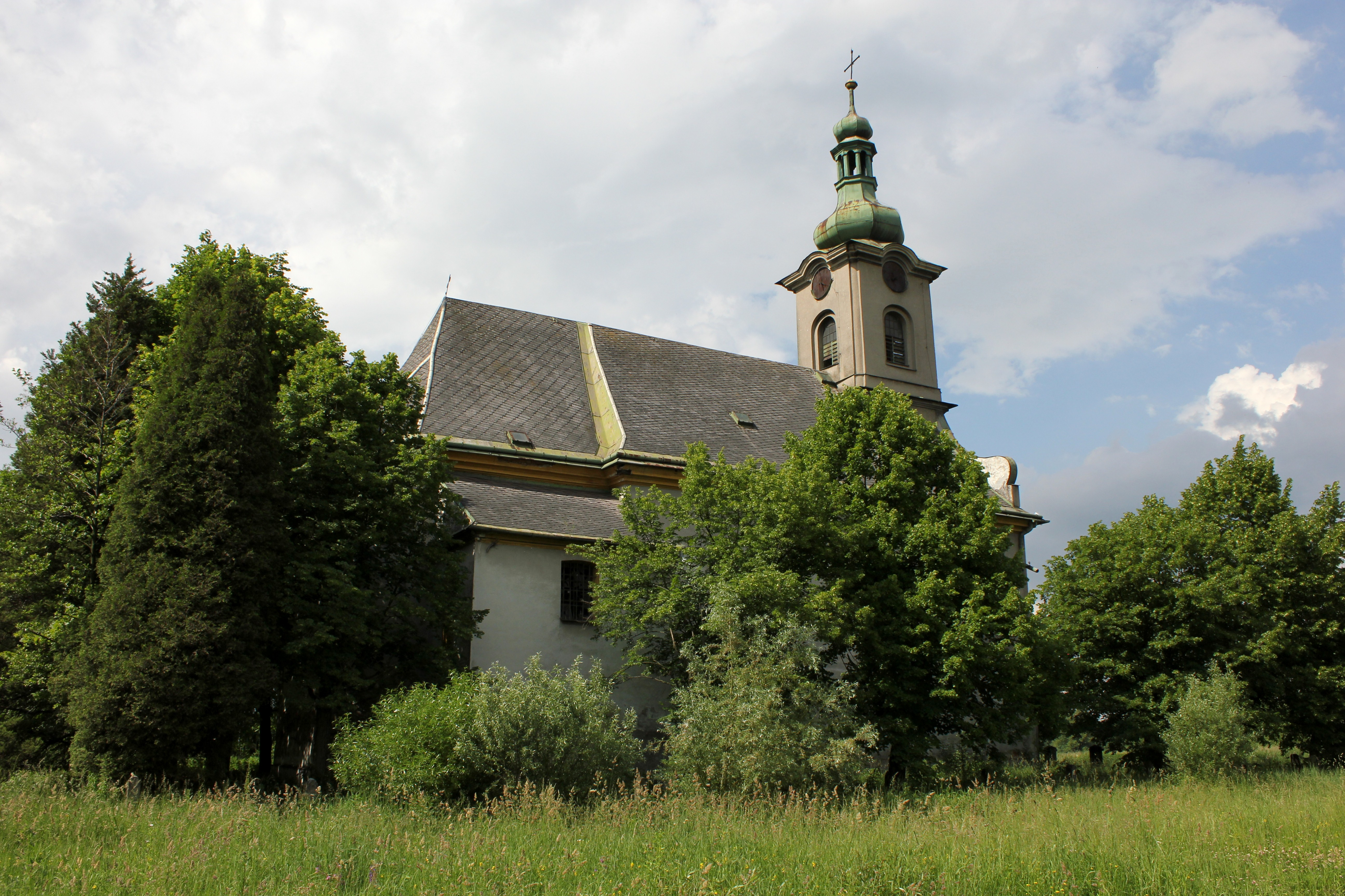 Kostel sv. Barbory, Karviná-Louky.